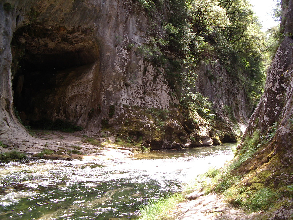 Grotte en aval de la résurgence de la Vis